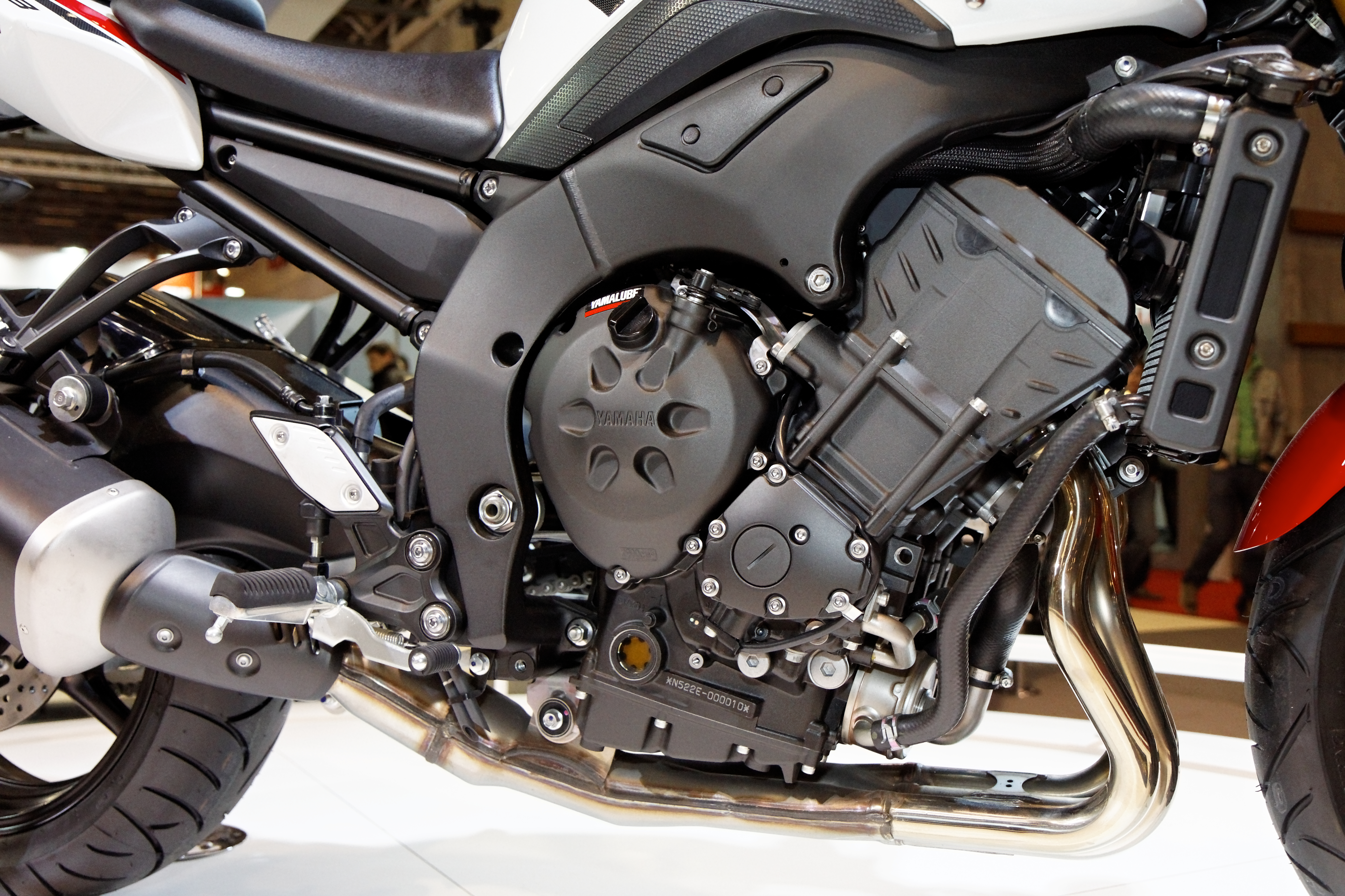 Une moto Yamaha au salon de la moto, Paris, porte de Versailles.